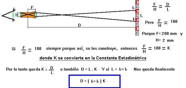 Método de medición estadimétrico